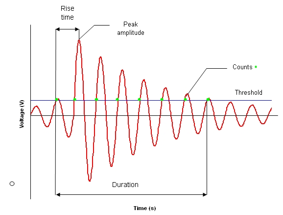 Figure 5 רישיון נוצר על ידי משתמש:Boris.muravin